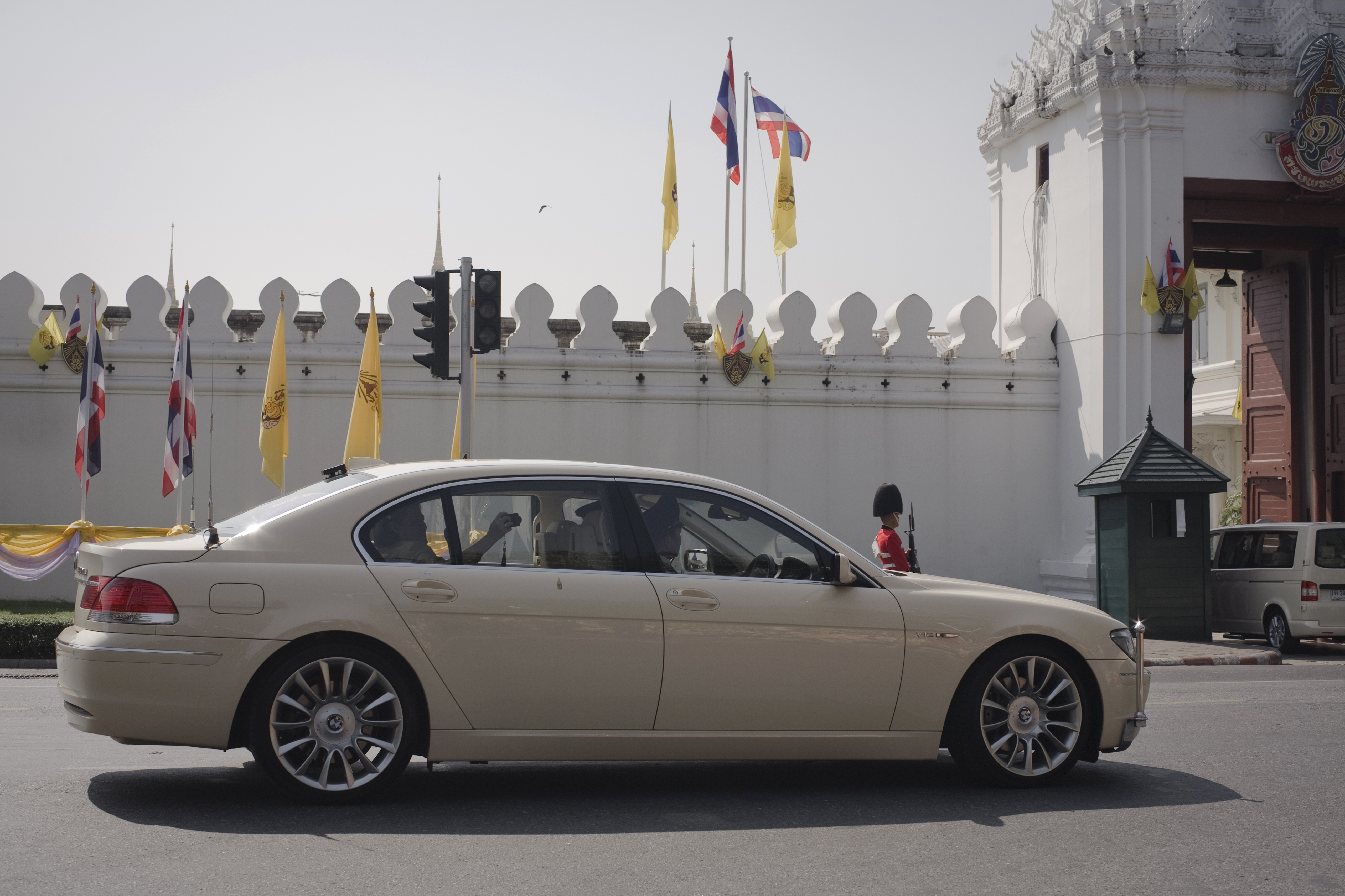 สมเด็จพระเทพรัตนราชสุดาฯ สยามบรมราชกุมารี ประสกนิกรของในหลวงร่วมรับเสด็จพร้อมเปล่งเสียงเดียวกัน "ทรงพระเจริญ" ณ บริเวณพระบรมมหาราชวัง ถนนหน้าพระลาน วันอาทิตย์ ที่ 5 ธันวาคม พ.ศ.2553 (Photographer attached to the Prime Minister of the Kingdom of Thailand : Peerapat Wimolrungkarat / พีรพัฒน์ วิมลรังครัตน์) @is50mm รถยนต์พระที่นั่ง BMW 760Li E66 ทะเบียน 1ด-1993 รถพระที่นั่งในสมเด็จพระเทพรัตนราชสุดาฯ สยามบรมราชกุมารี ในพระราชพิธีเฉลิมพระชนมพรรษา 5 ธันวาคม 2553